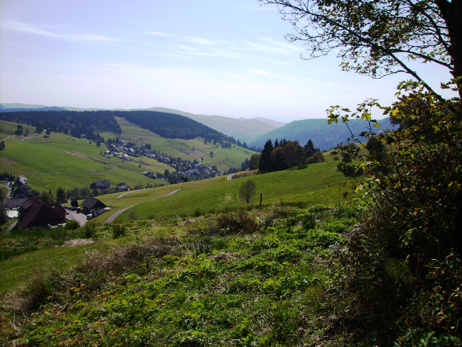 Martin Heidegger Blick von seiner Hütte über das Todtnauer Land; view from Heidegger's mountain hut over Todtnau